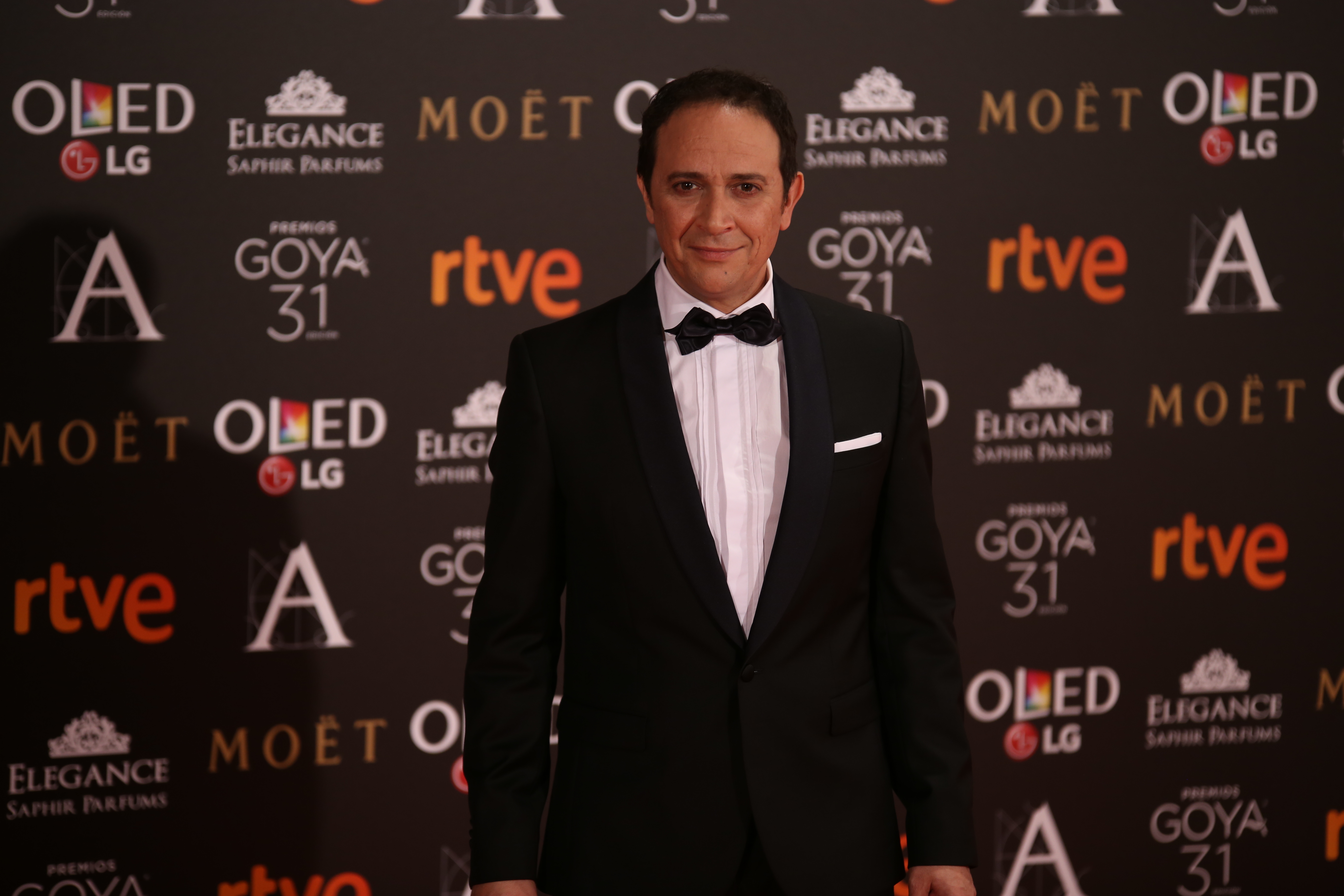 Premios Goya 2017